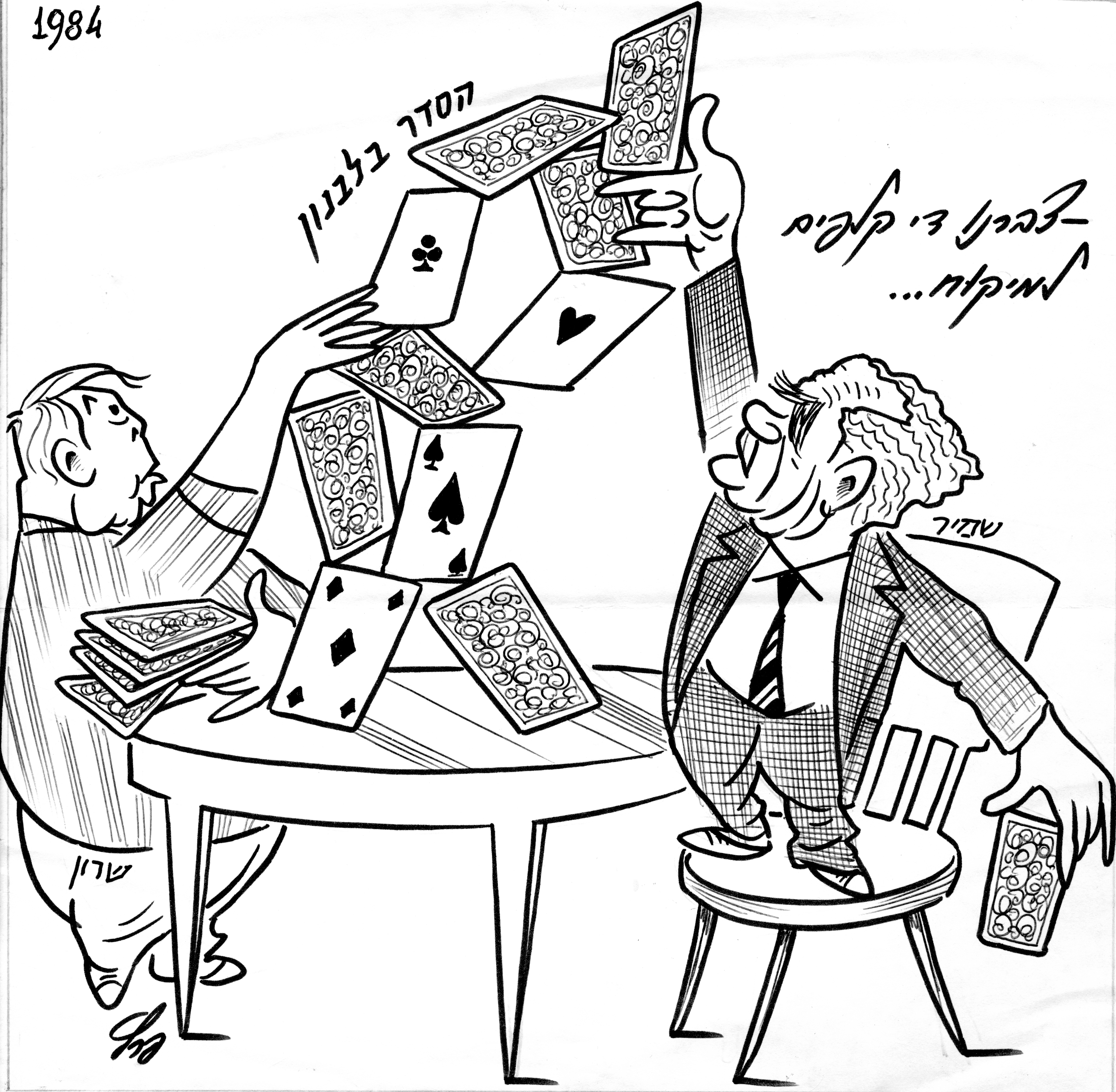 Cartoon